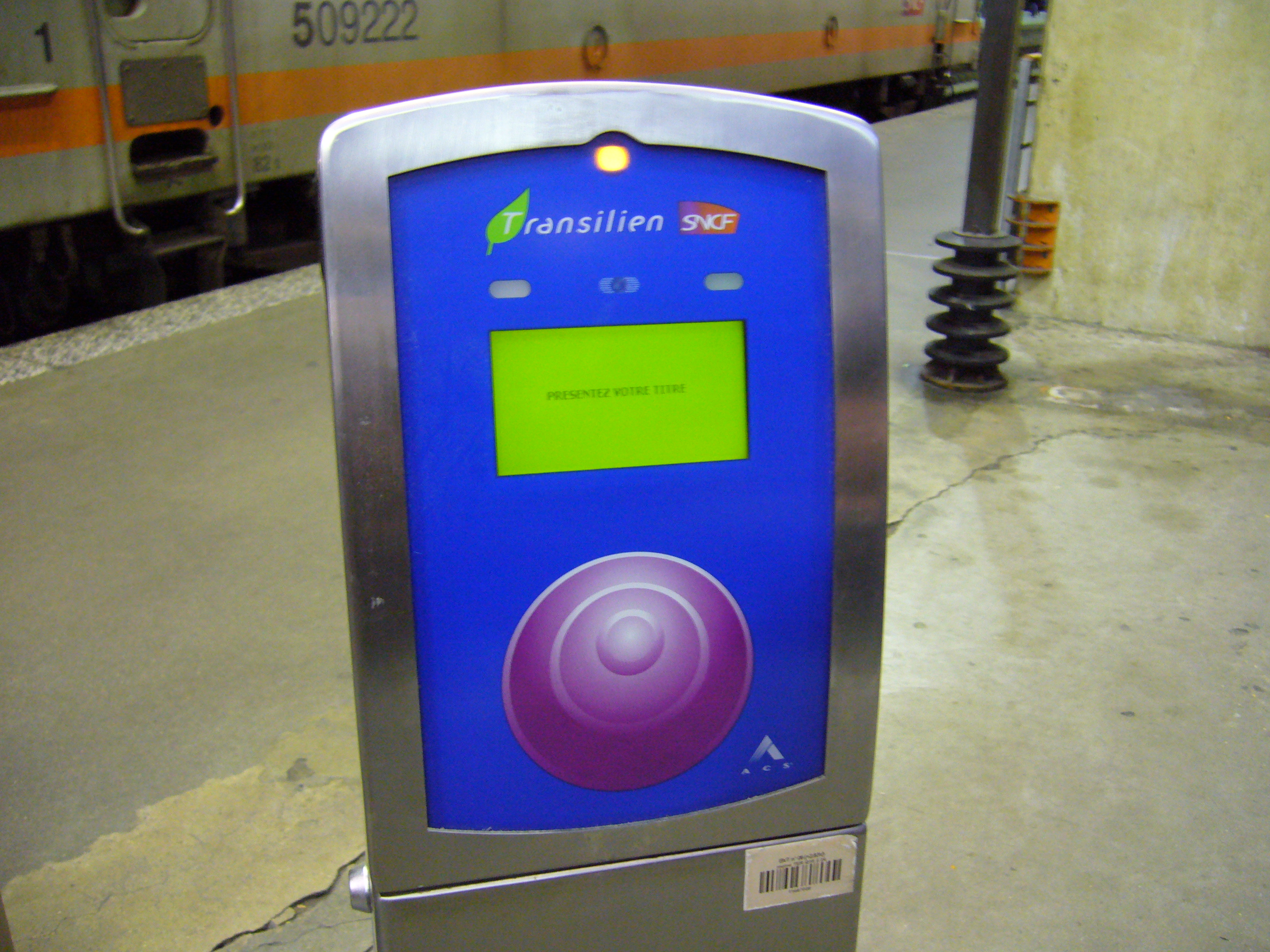 Un validateur Navigo sur le réseau Transilien.